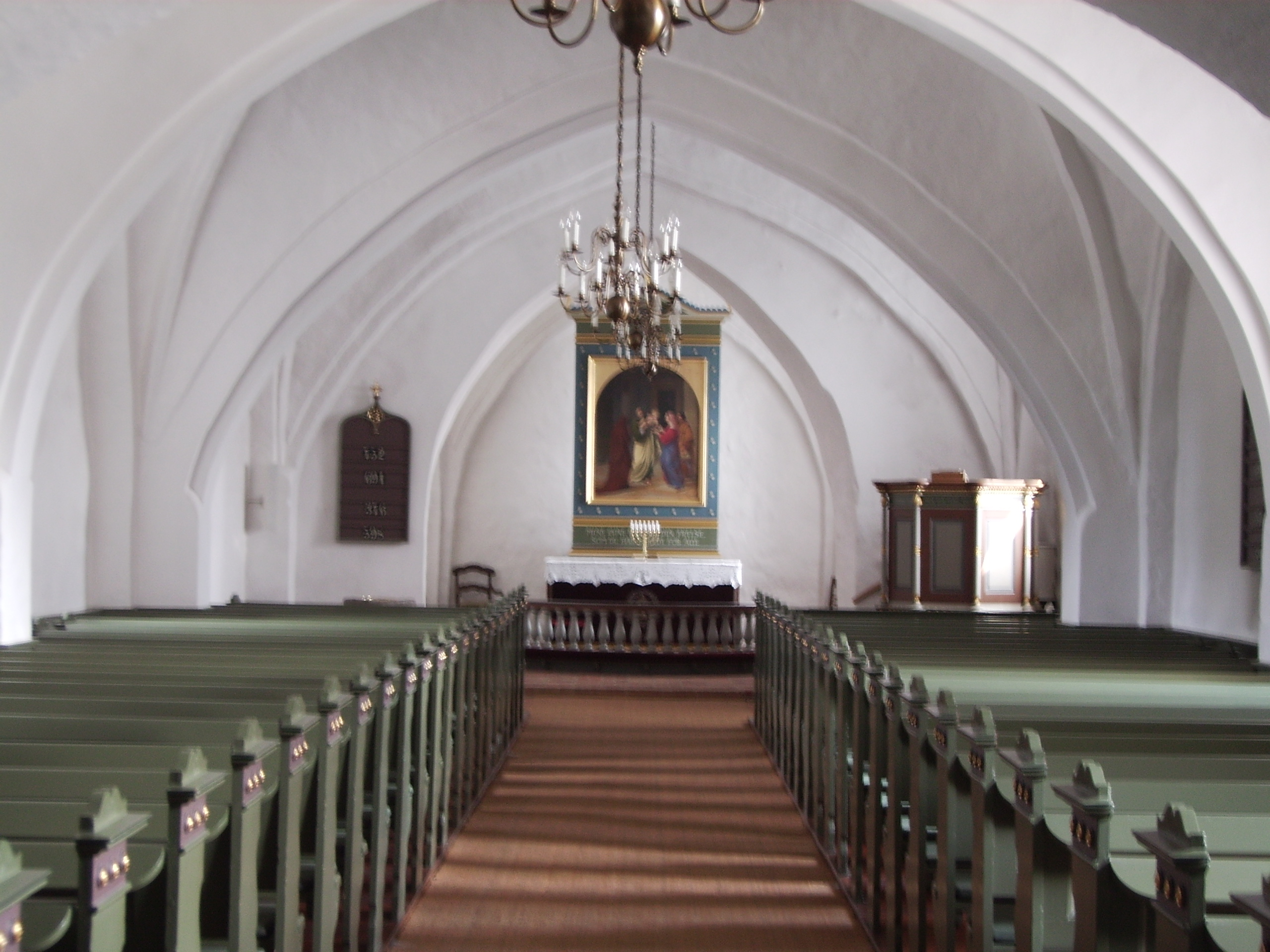 Krogsbølle Kirkes indre, Krogsbølle Sogn, Skam Herred, Odense Amt, Denmark (Danish Church)